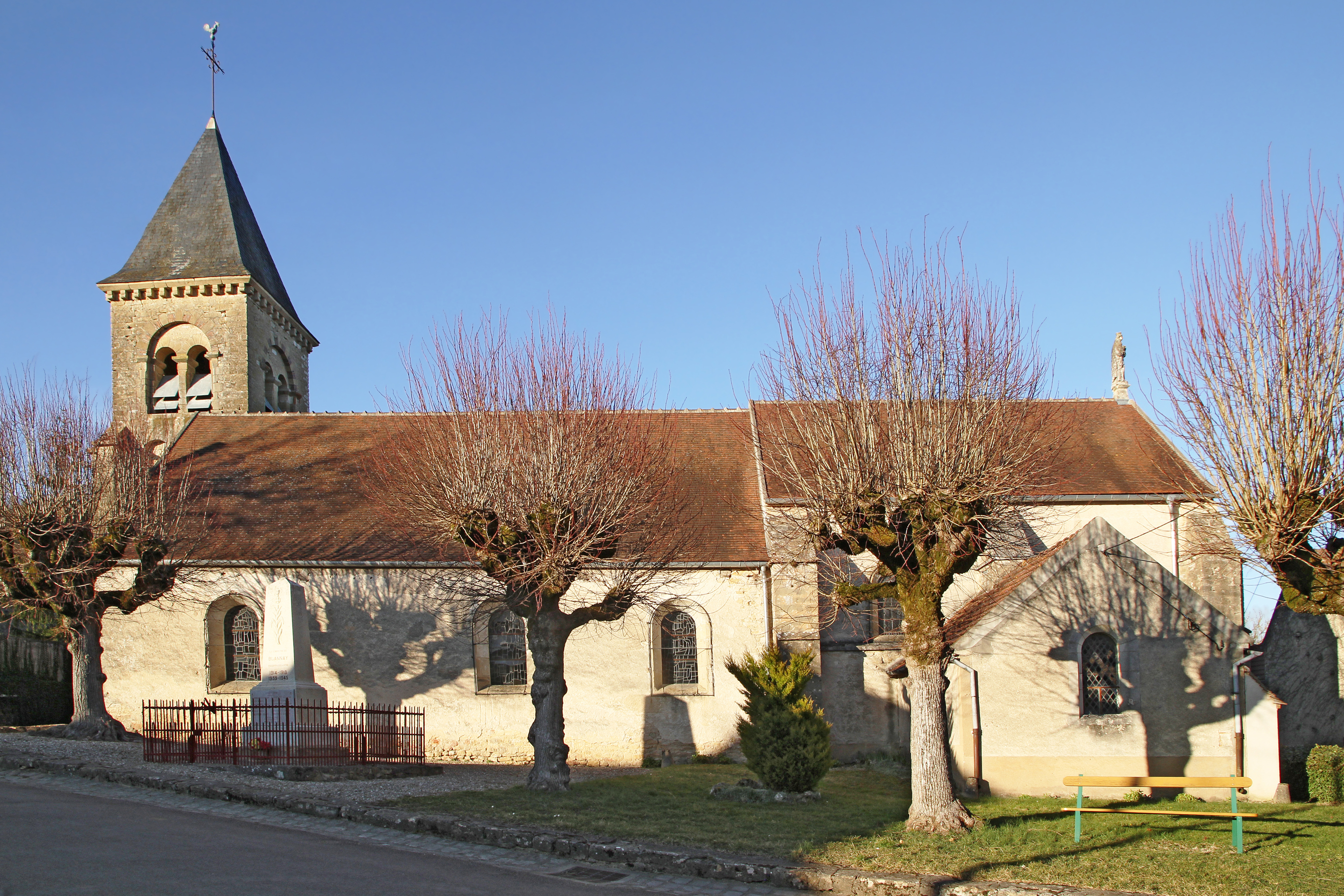 Église Saint-Pierre de Blannay côté ouest